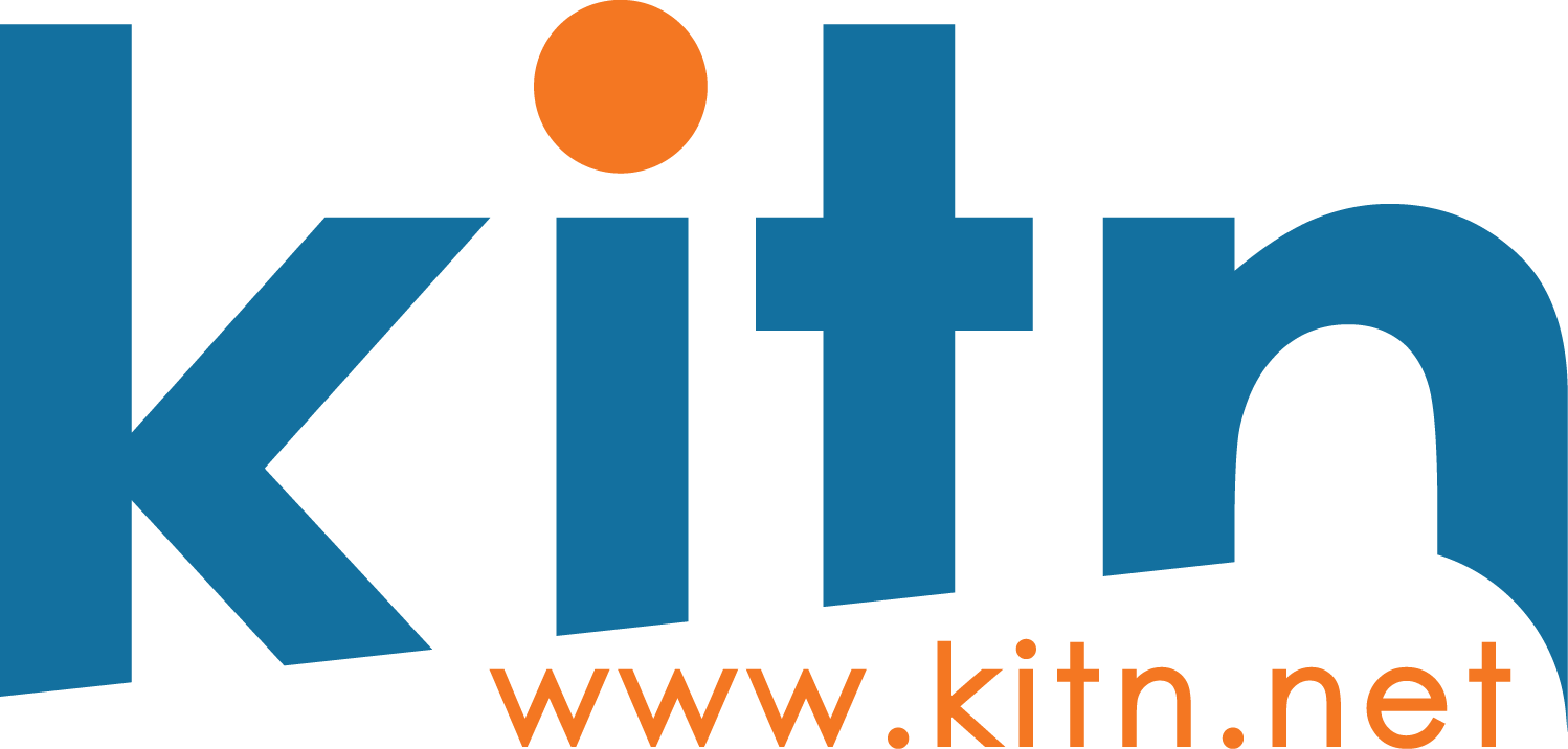 کوردی: ئەمە لۆگۆی فەرمی ماڵپەڕی تۆڕی تەکنەلۆژیای زانیاری کوردییە.